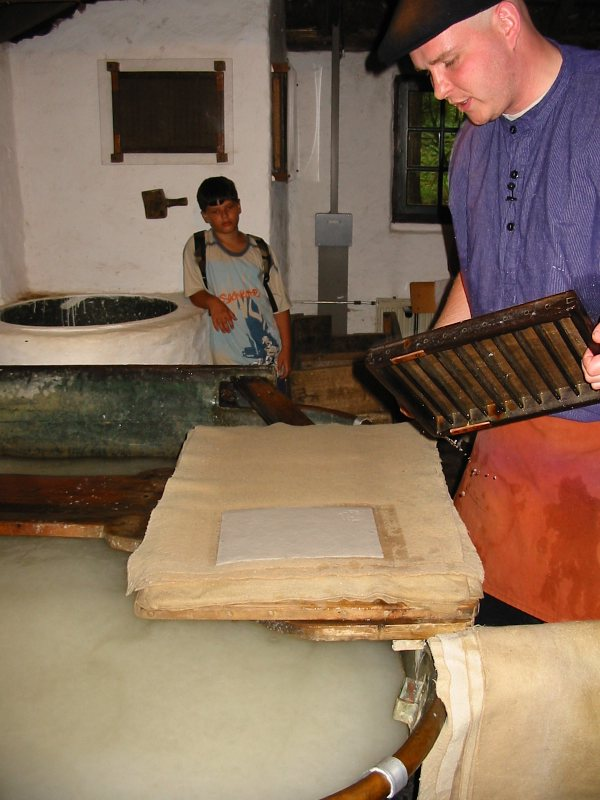 Het natte vel papier wordt op viltdoeken uitgelegd (Foto: Hans de Kroon)